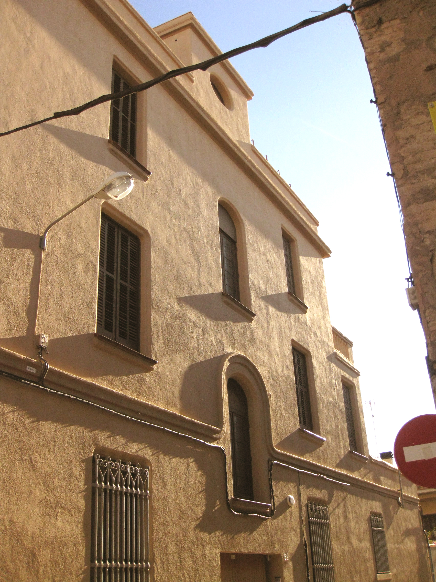 Casa Emili Soler, obra de Lluís Muncunill de 1917, al carrer de Joaquim de Paz cantonada amb el carrer del Passeig (Terrassa). Detall de la façana que dóna al carrer del Passeig.